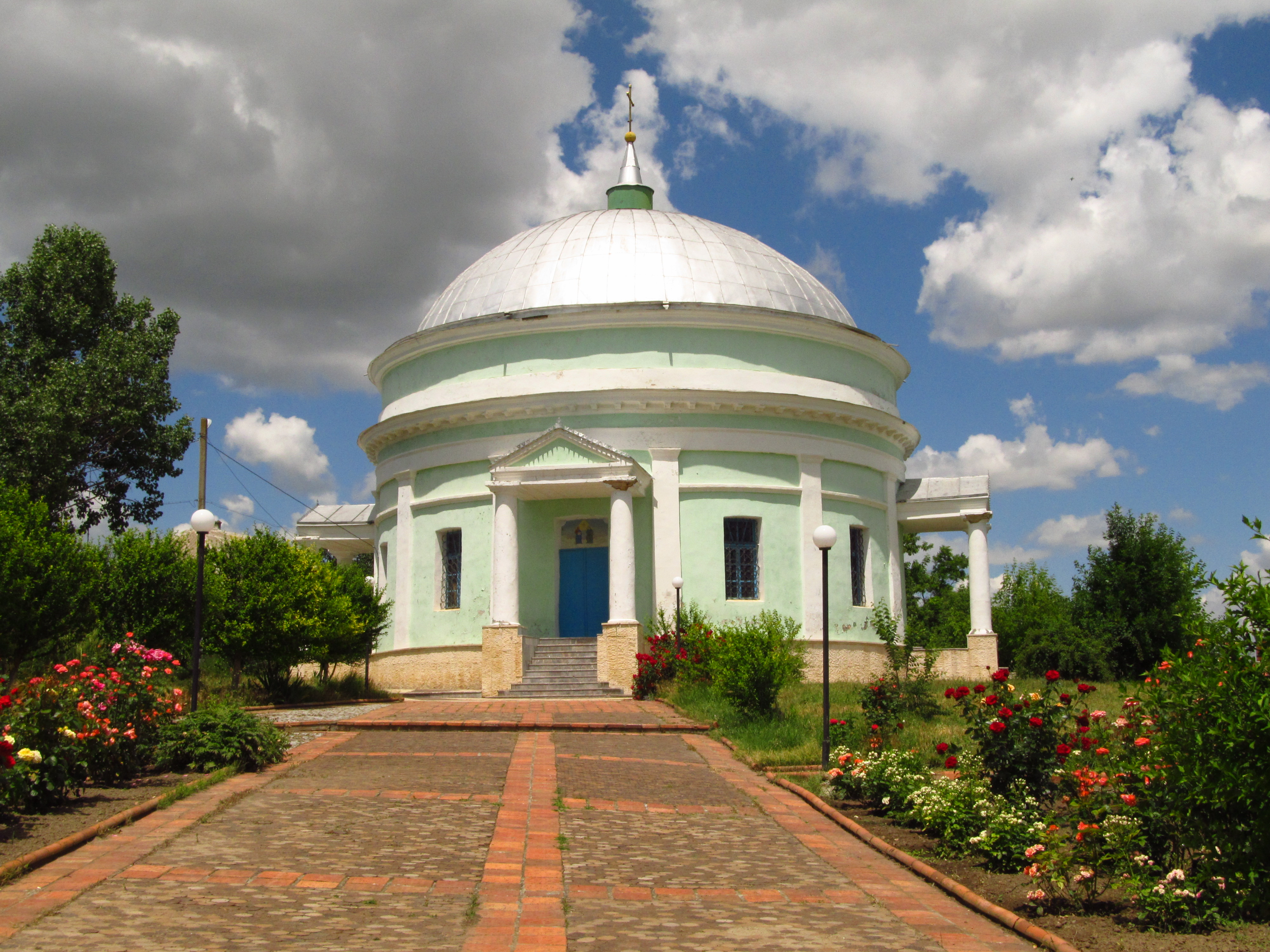 Троїцька церква, Лощинівка